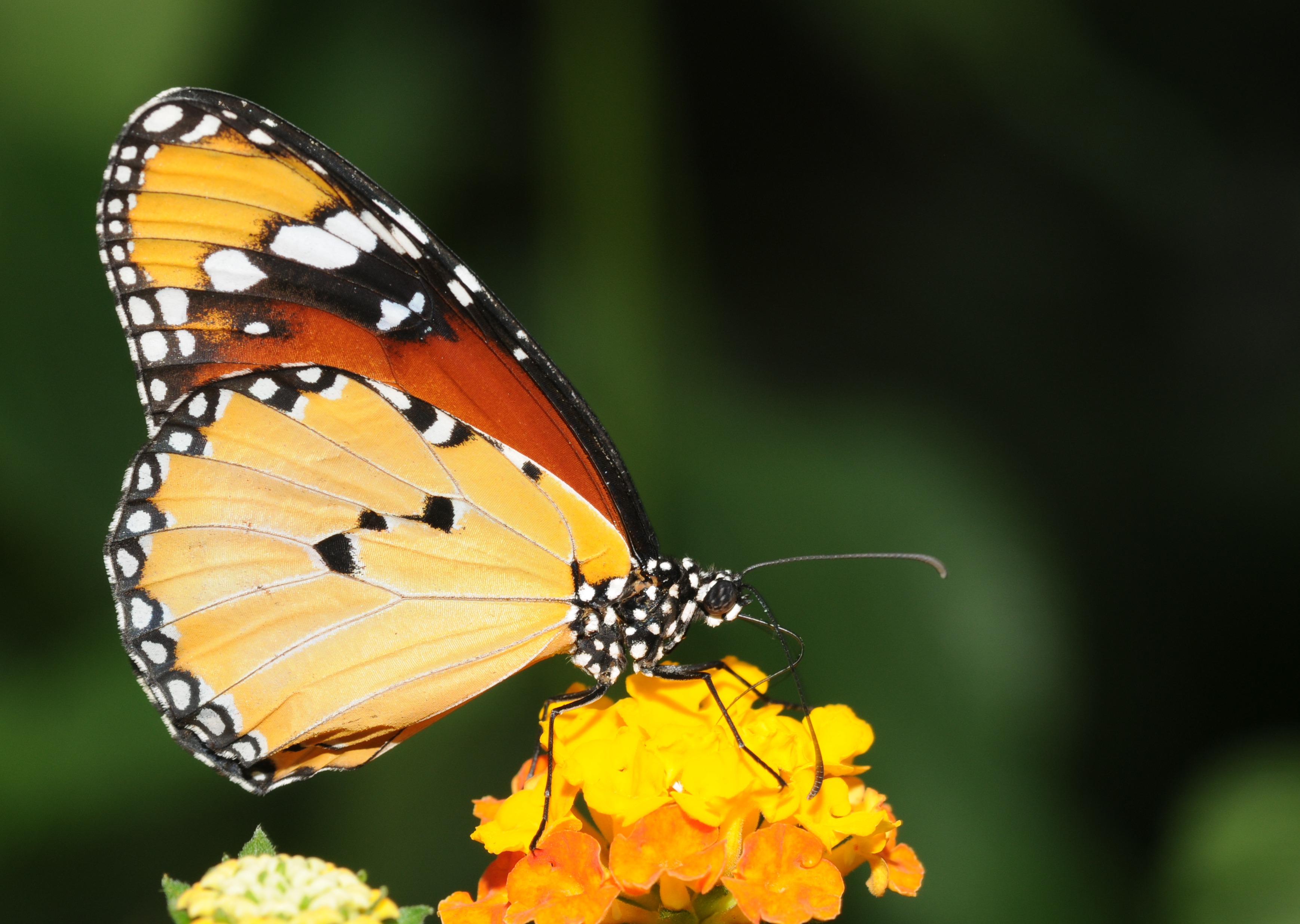 Petit monarque.. . Jardin des papillons, Hunawihr.